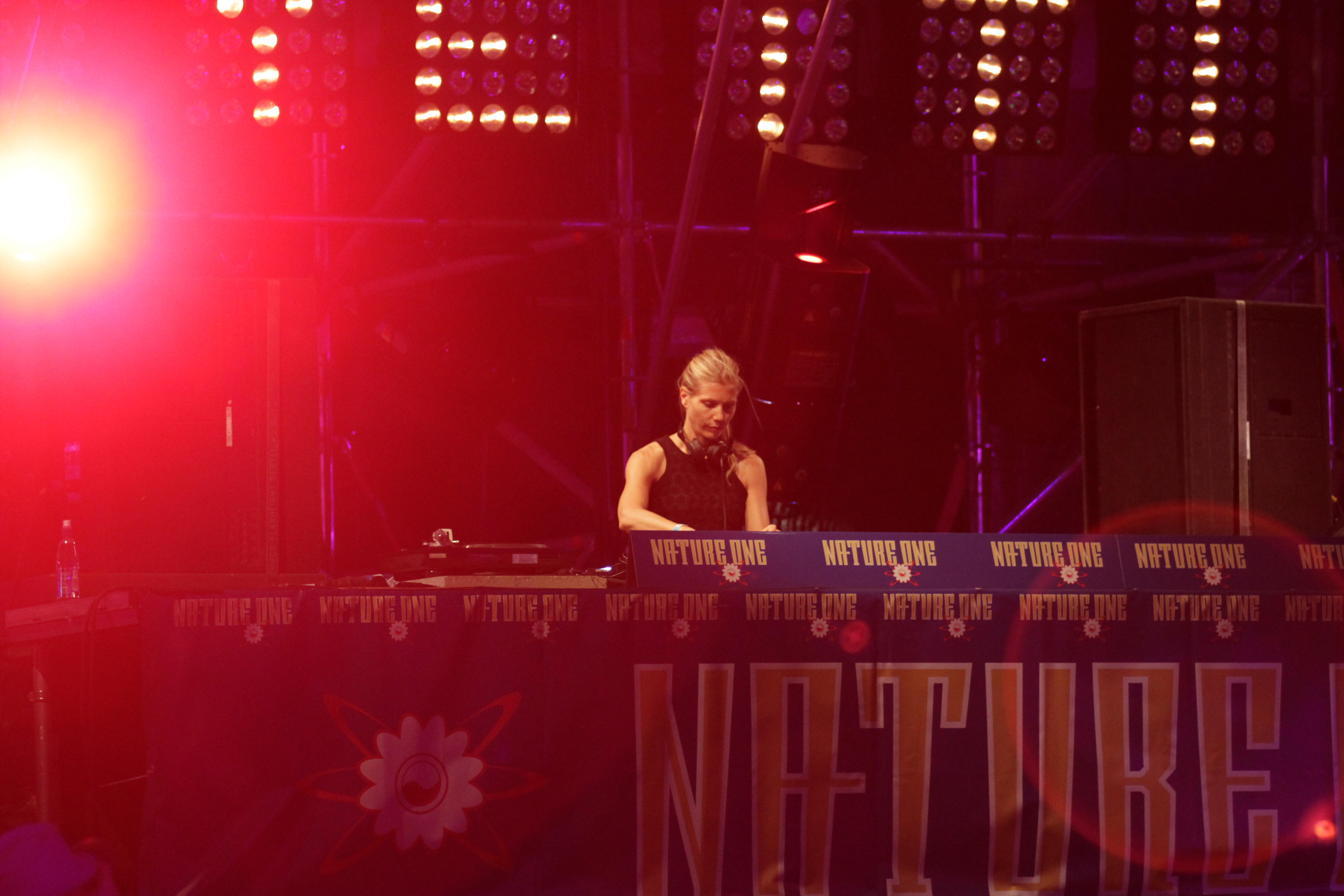 Miss Yetti im Classic Terminal.